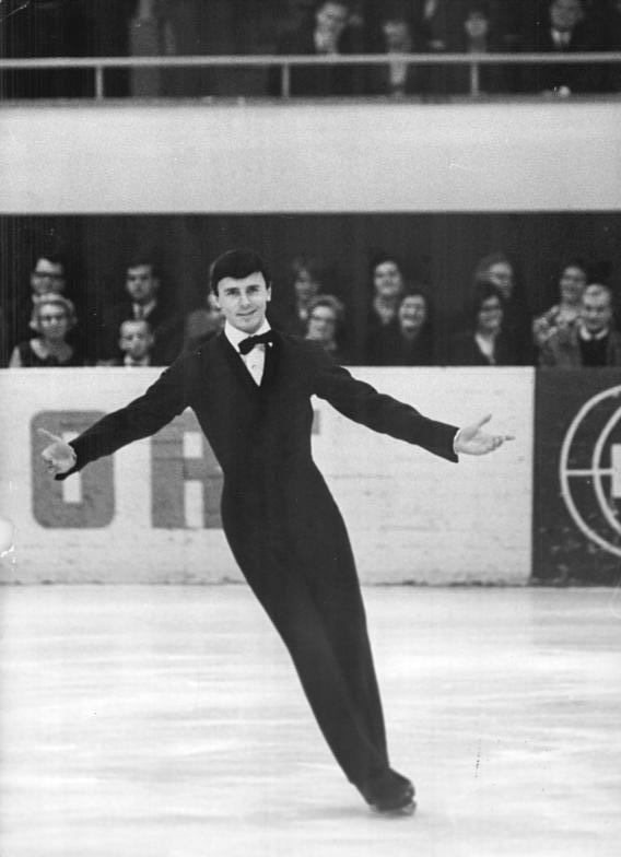 Emmerich Danzer Zentralbild Mittelstädt 15.10.1967 Berlin: Eiskunstlauf - Internationales Schaulaufen. Zu den begeistert gefeierten Gästen beim internationalen Schaulaufen am 14.10.1967 in der Berliner Werner-Seelenbinder-Halle gehörte der Welt- und Europameister Emmerich Danzer (Österreich) .